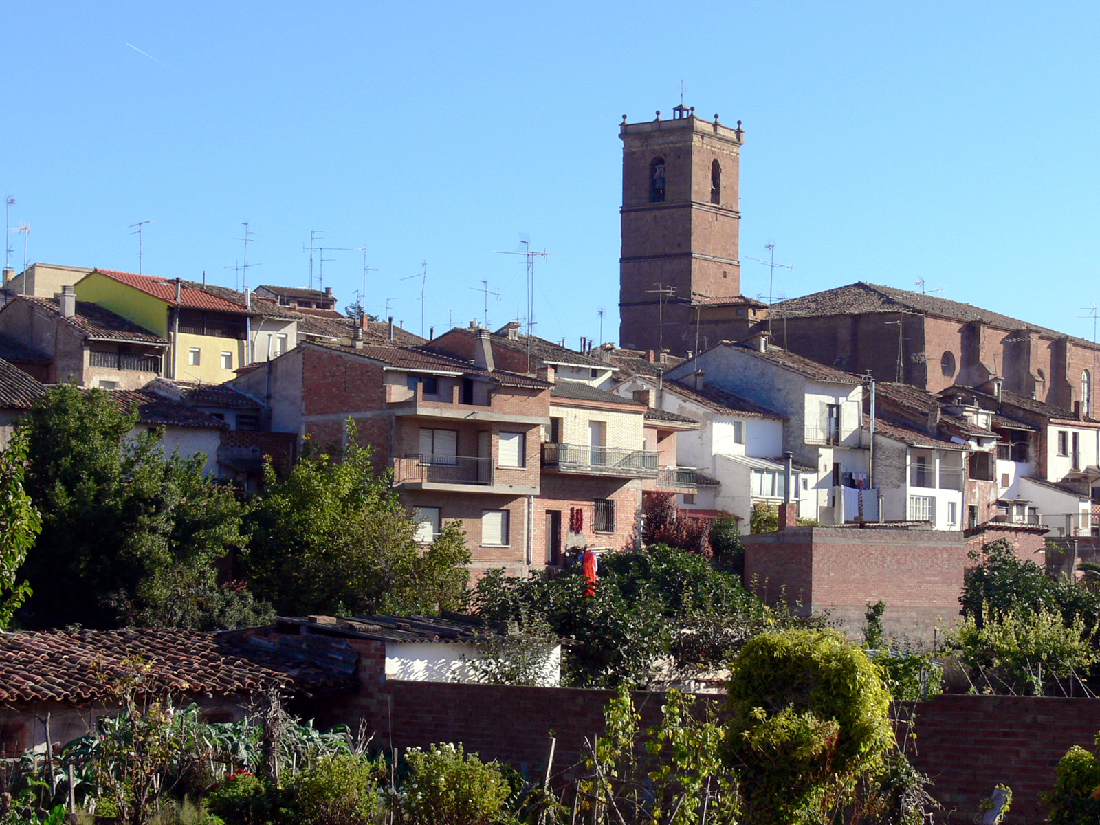 Vista de Arenzana de Abajo en La Rioja (España).